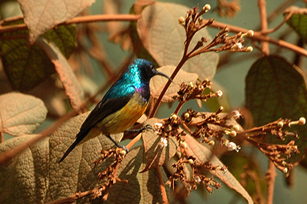 Uganda Variable Sunbird (Cinnyris venustus) Ruhija, Bwindi NP Jan 2005